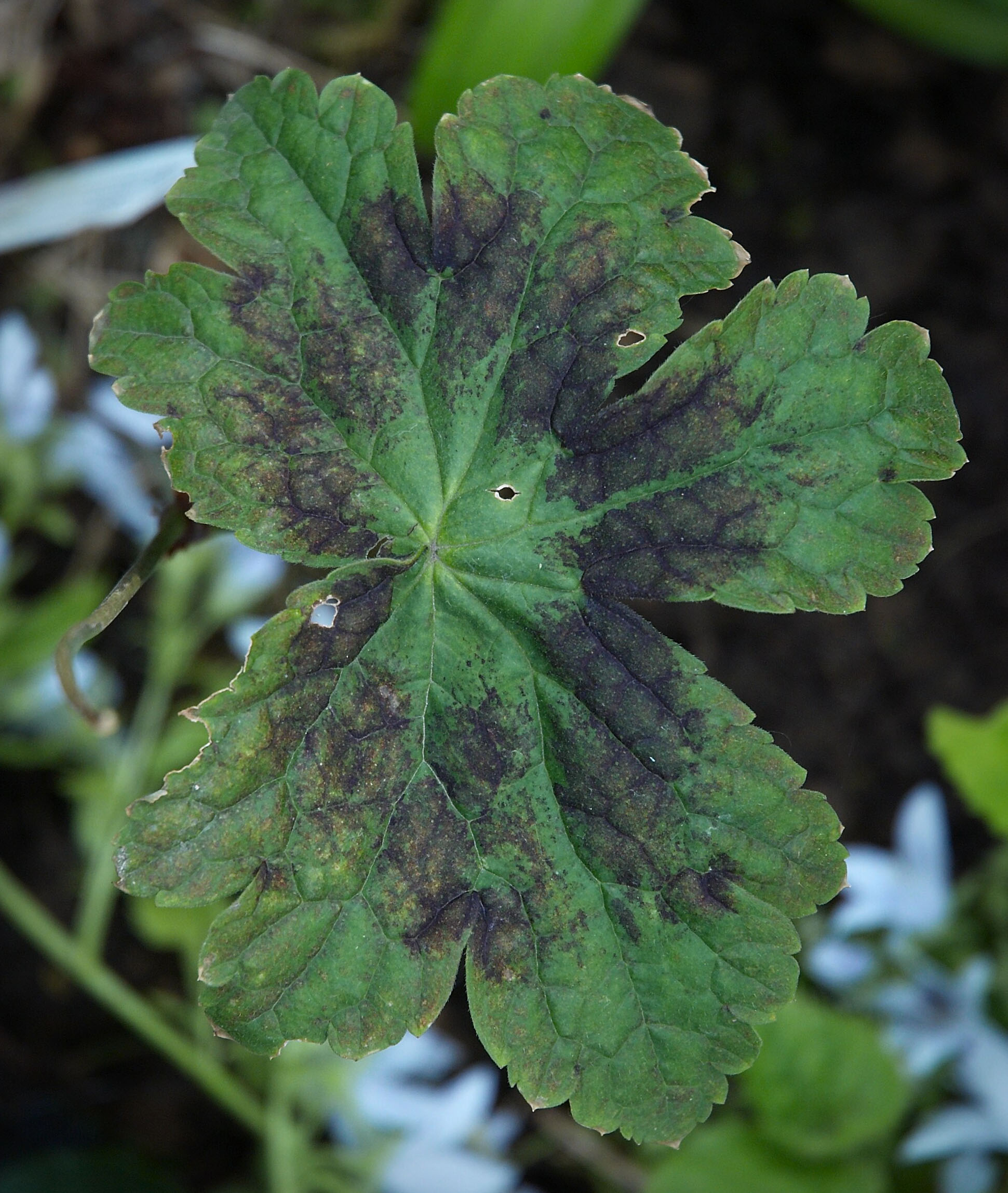 Geranium phaeum 'Samobor'